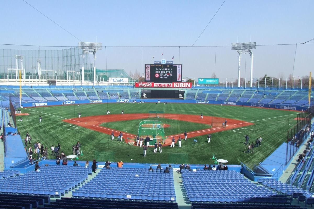 Meiji Jingu Stadium (remodeled)